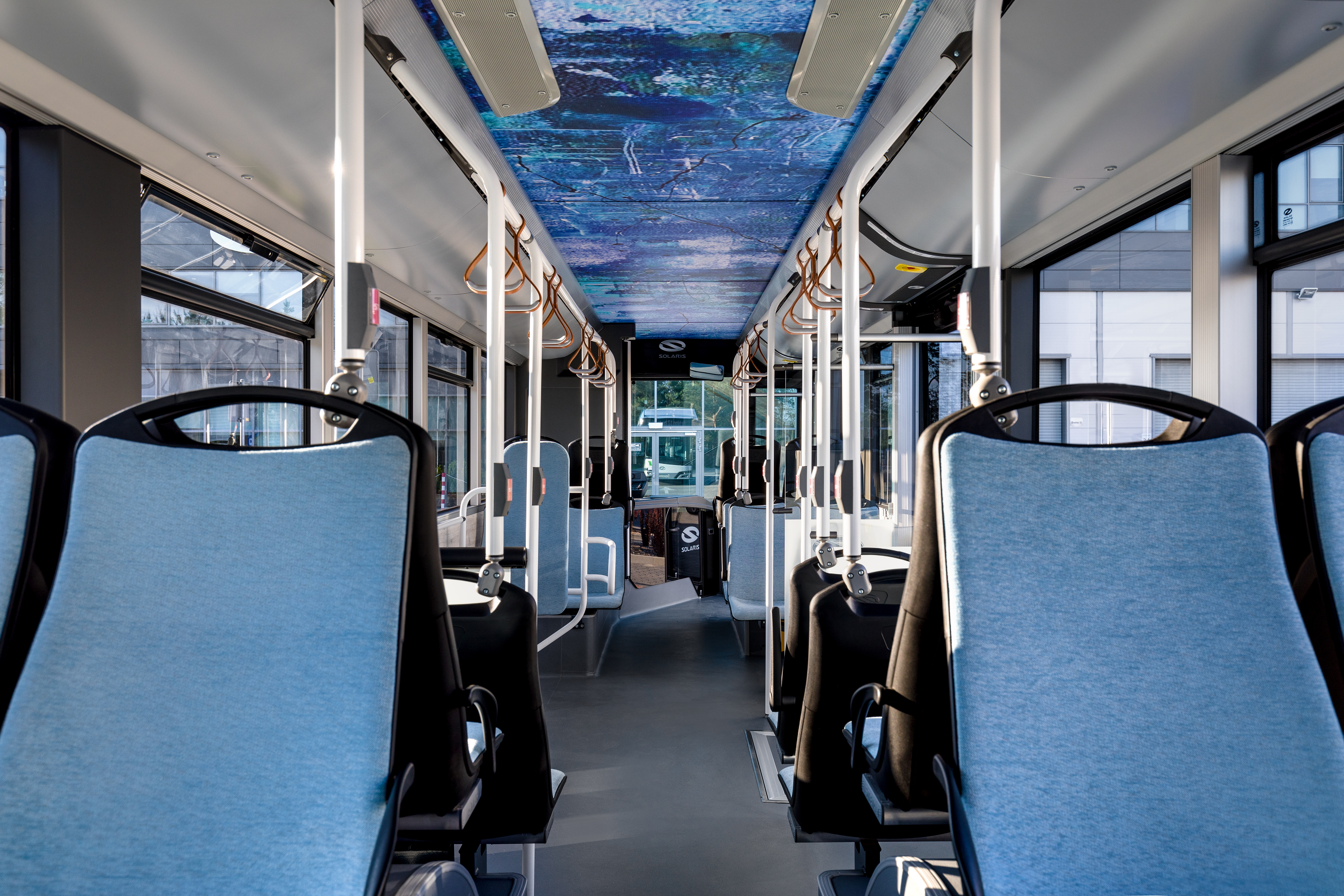 Solaris Urbino 12 hydrogen